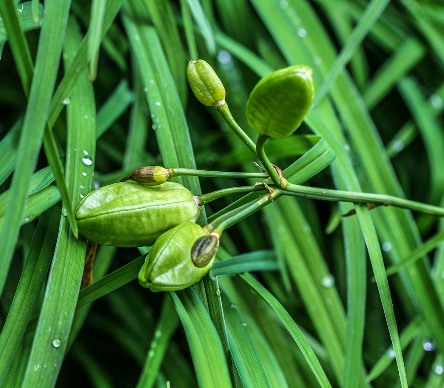 Slowenien, Julische Alpen: Botanischer Garten Alpinum Juliana in Trenta: Rispige Graslilie